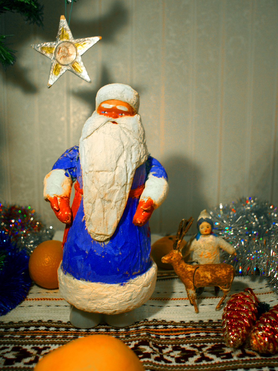 Новорічні прикраси: Фігурки Діда Мороза і новорічних прикрас (1950-ті), шишки (виробництво НДР, 1980-ті)